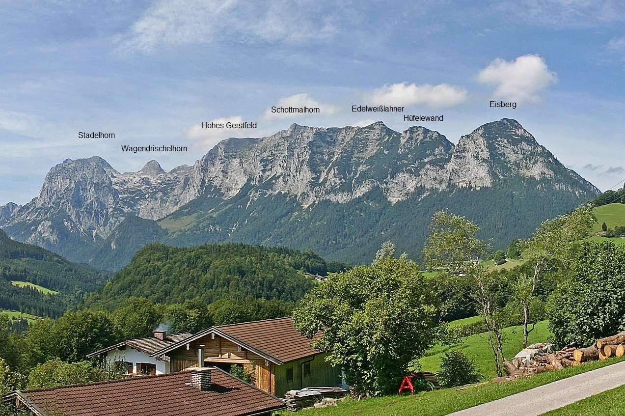 Reiter Alpe aus der Ramsau